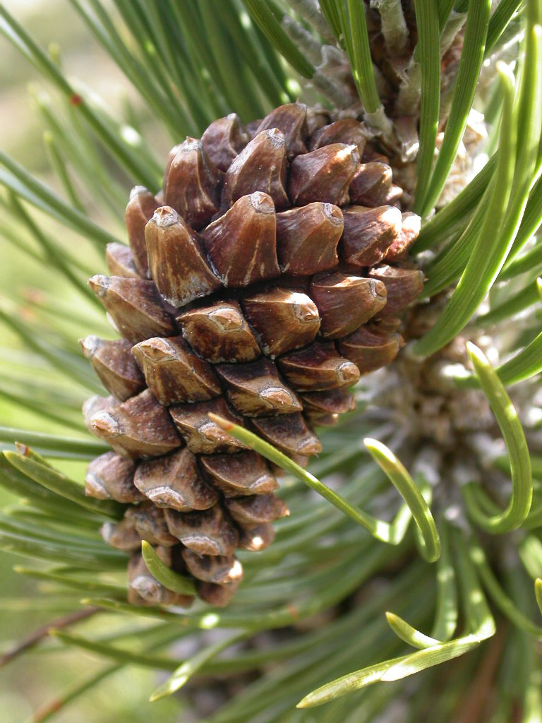 Pinus mugo subsp. uncinata detall escudets